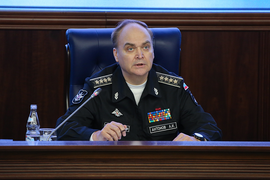 Заместитель Министра обороны России Анатолий Антонов выступает перед иностранными военными атташе в Национальном центре управления обороной государства